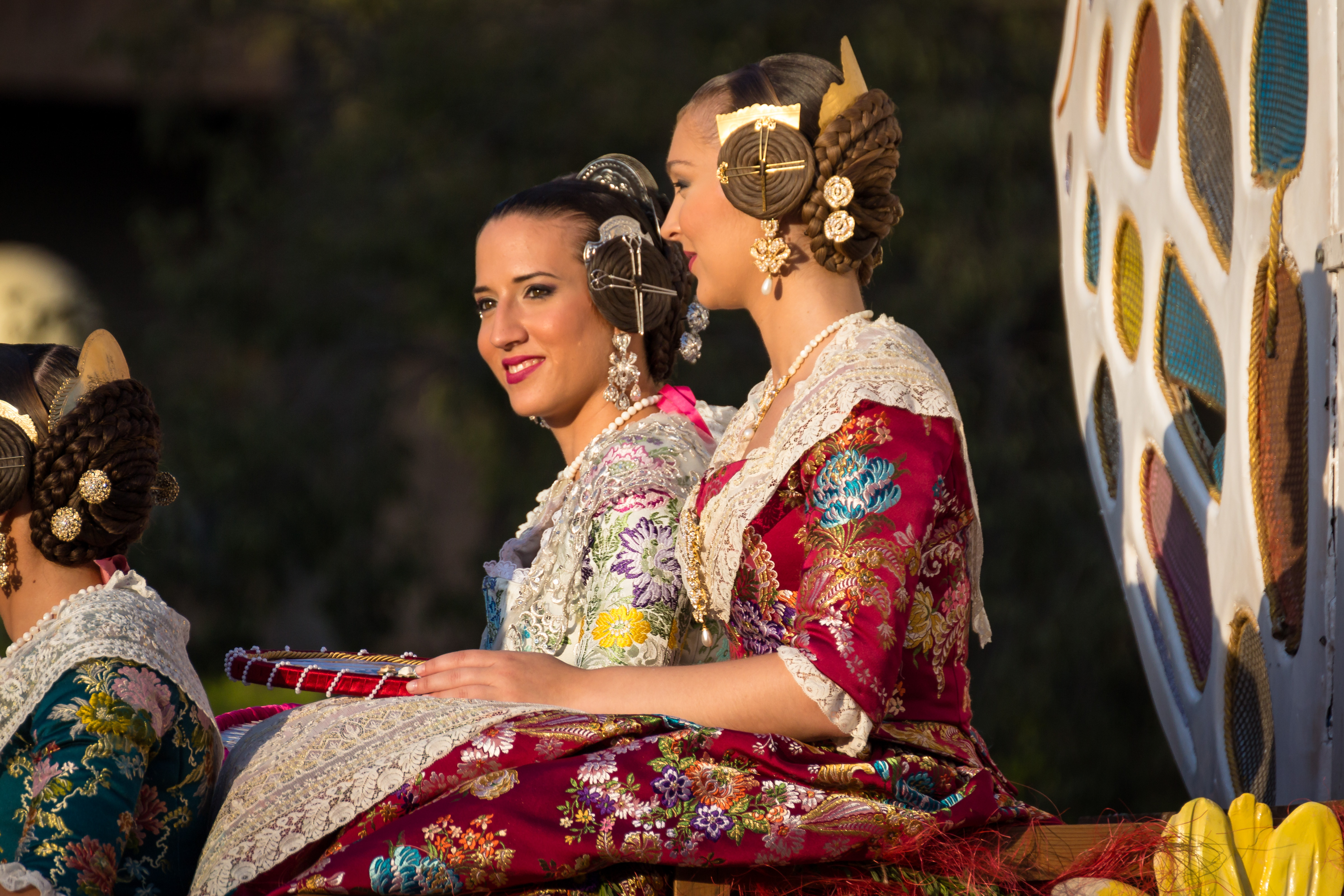 La tradicional Batalla de Flores cierra los festejos de la Fira de Juliol This is a photography of a Folklore festival in Spain (Wikidata id Q12175110).